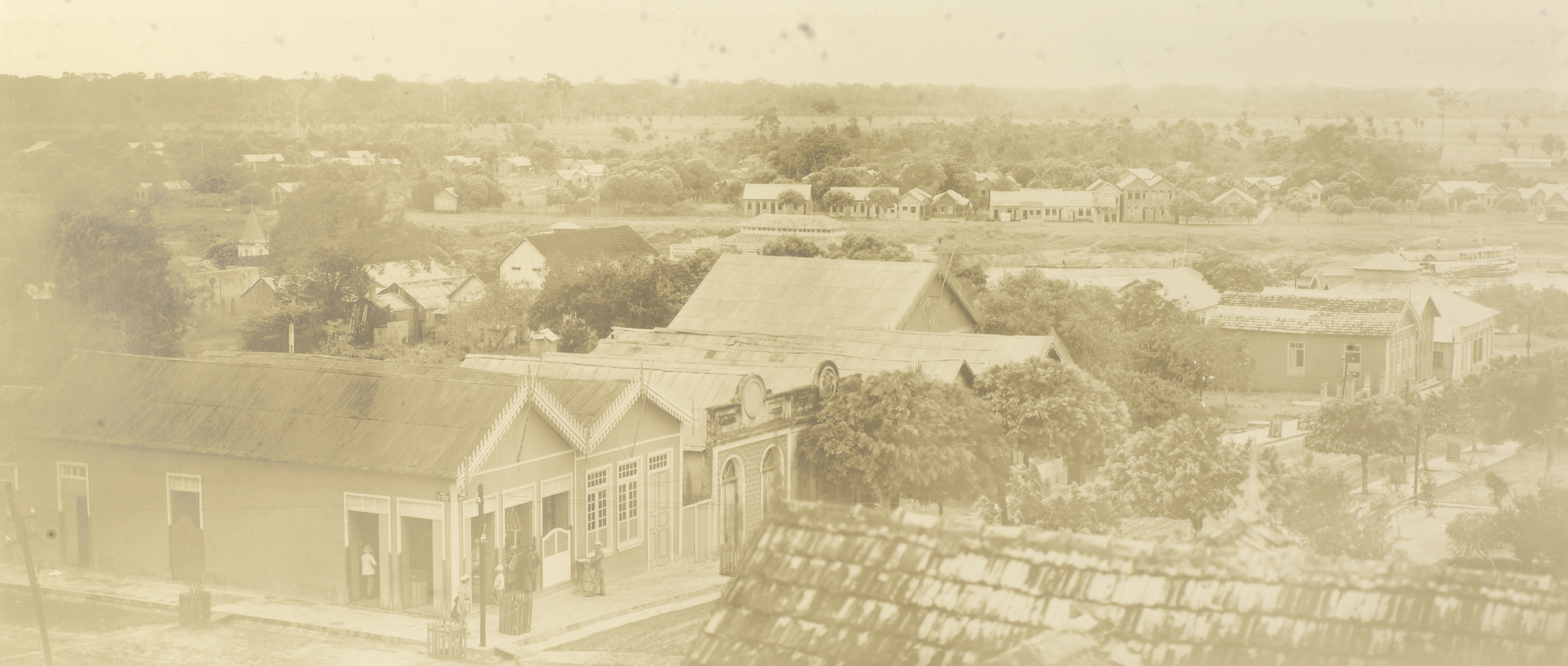 Imagem do Fundo Ministério da Guerra, do Arquivo Nacional